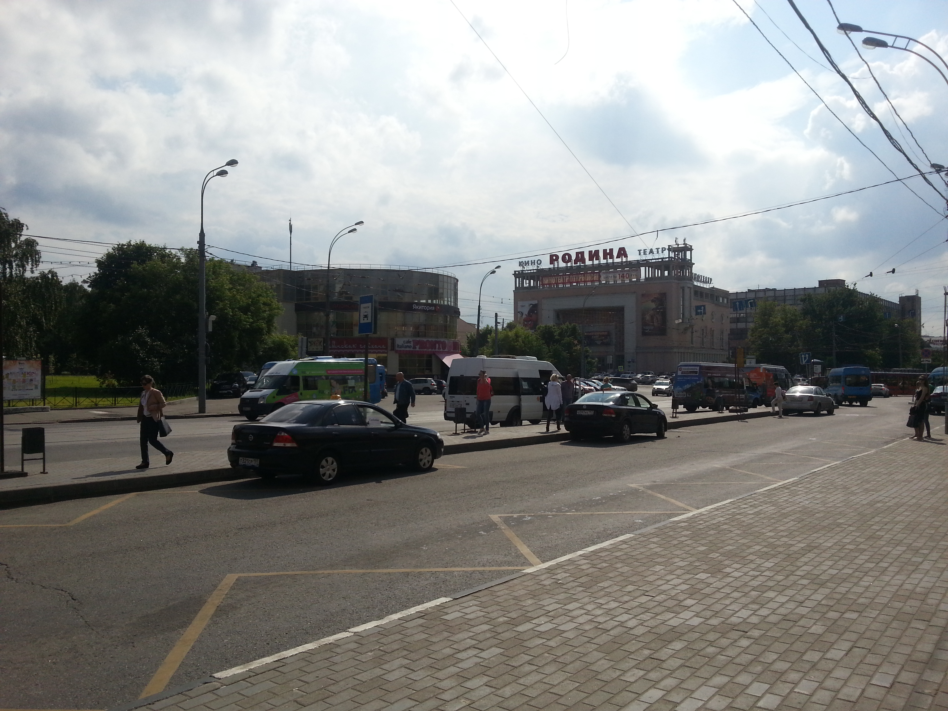 Вид на здание кинотеатра "Родина". 15 июня 2016г.